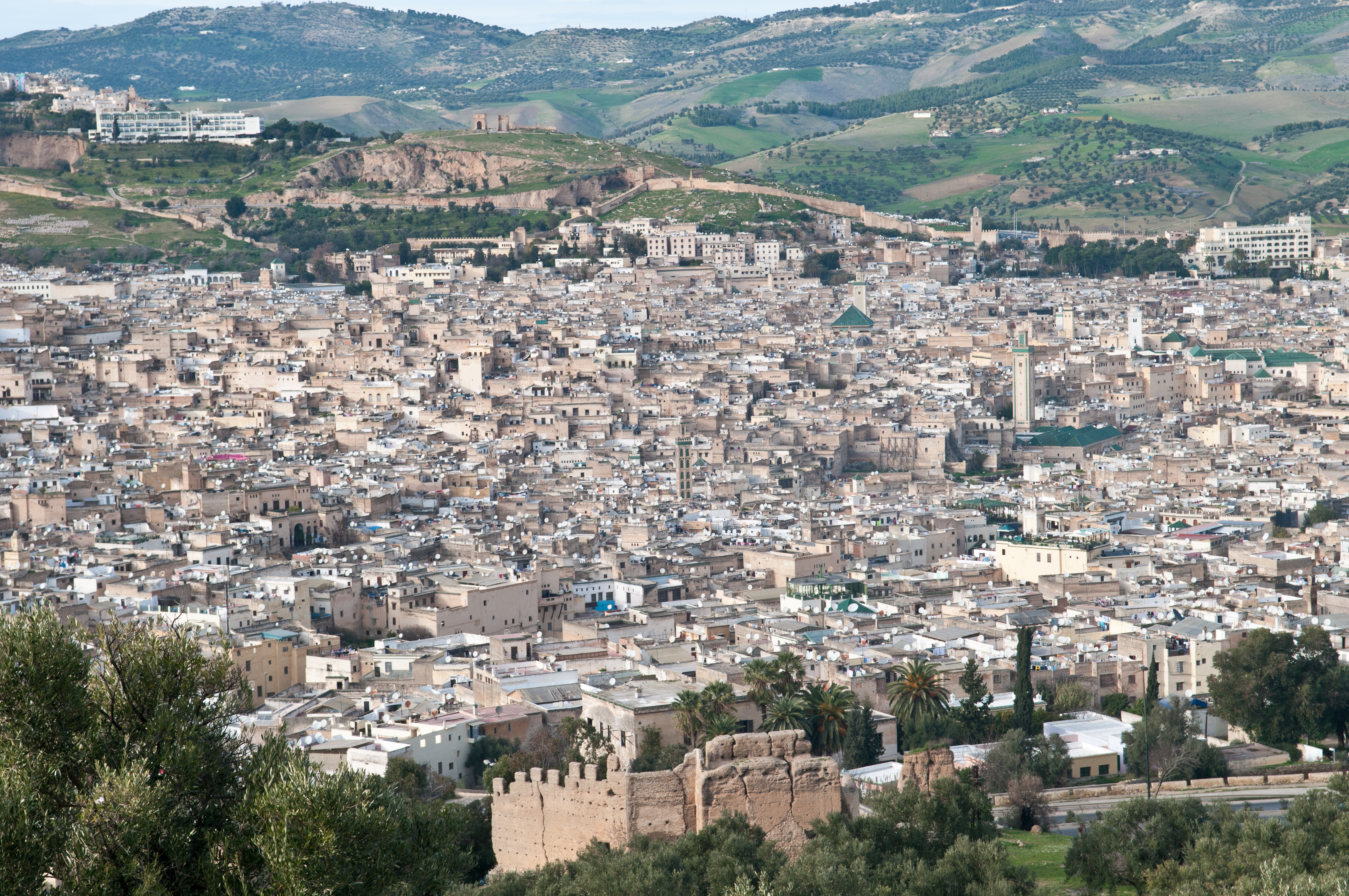 Fes